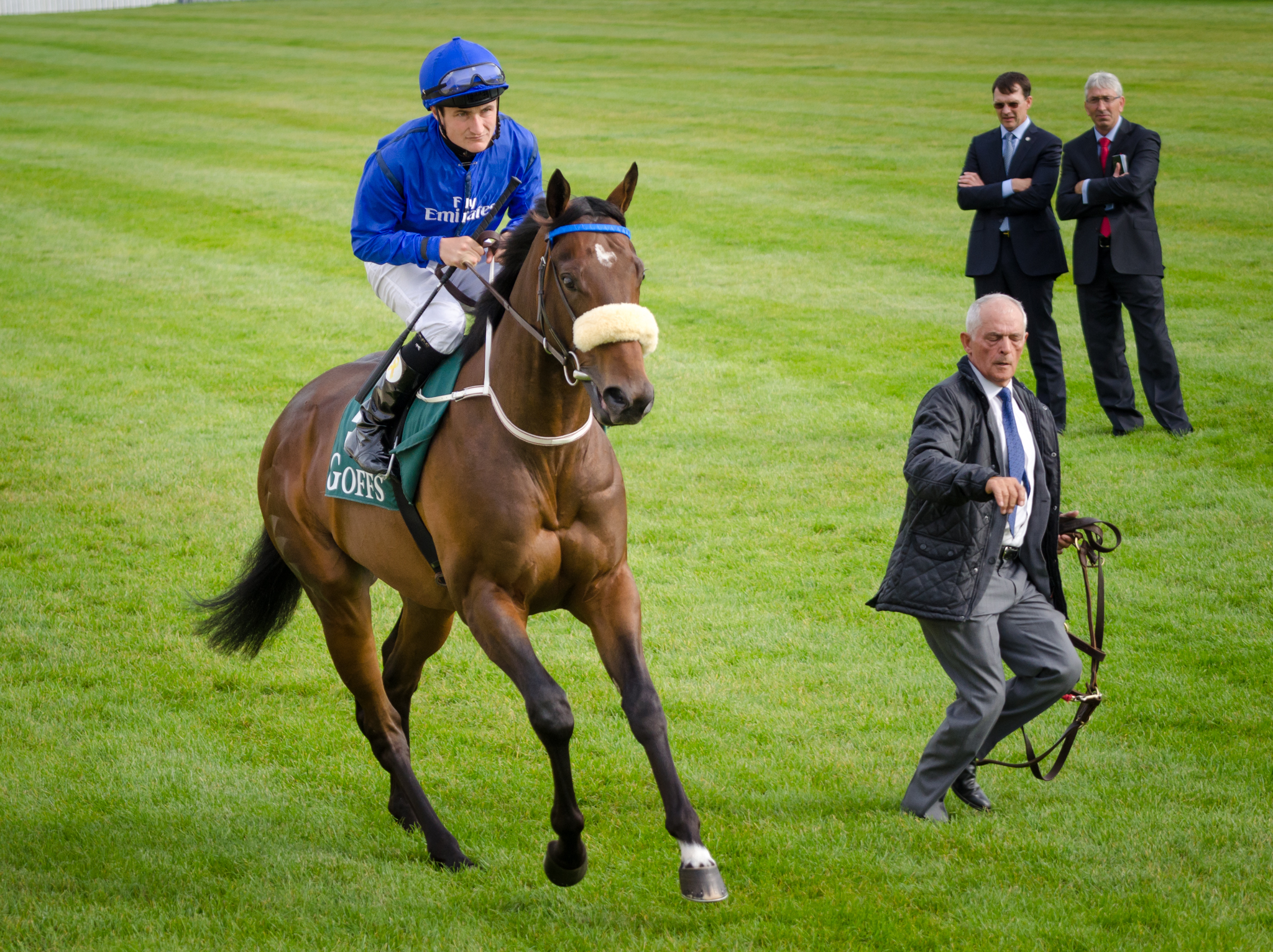 Encke